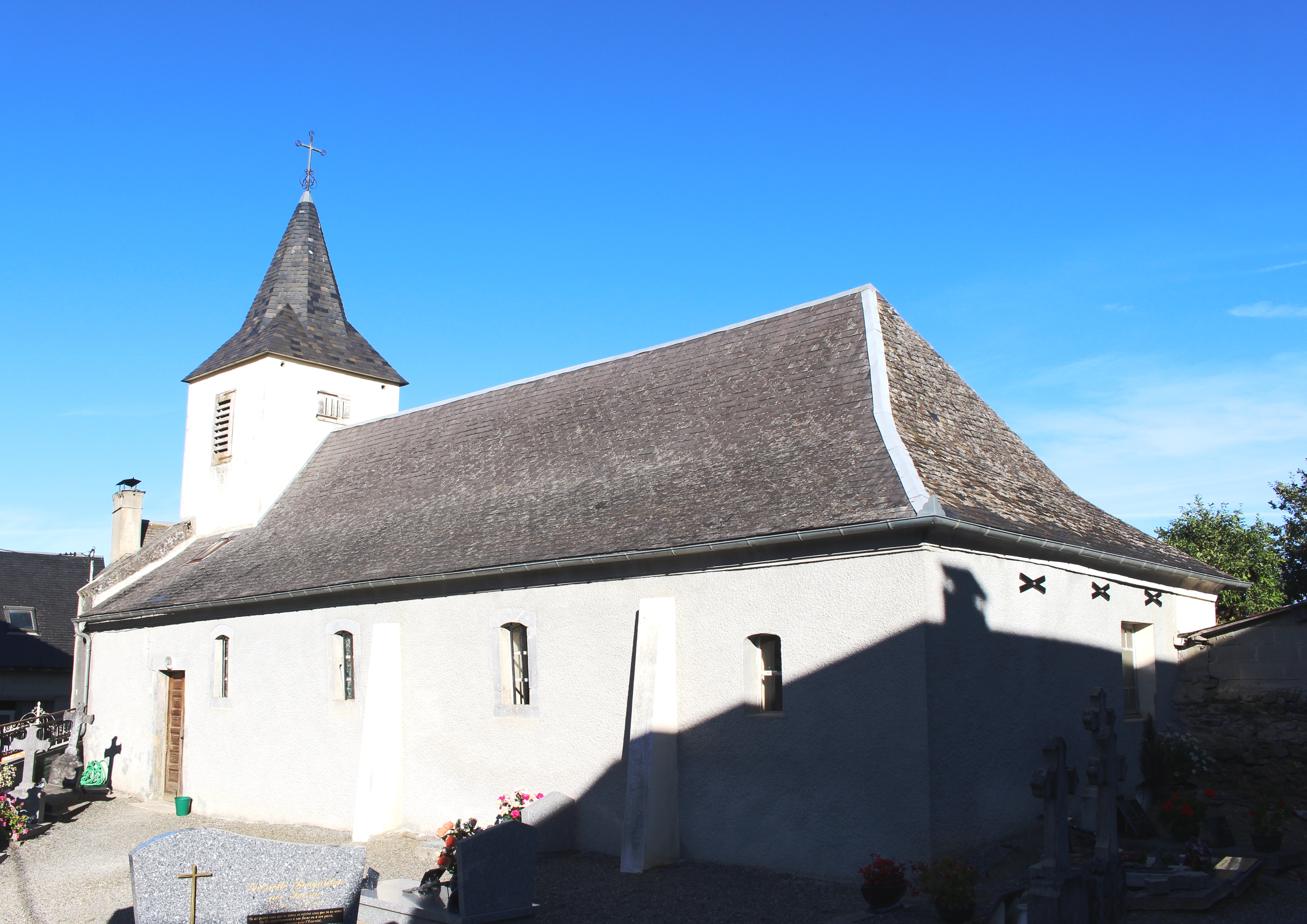 Église de la Toussaint d'Arrodets-ez-Angles (Hautes-Pyrénées)